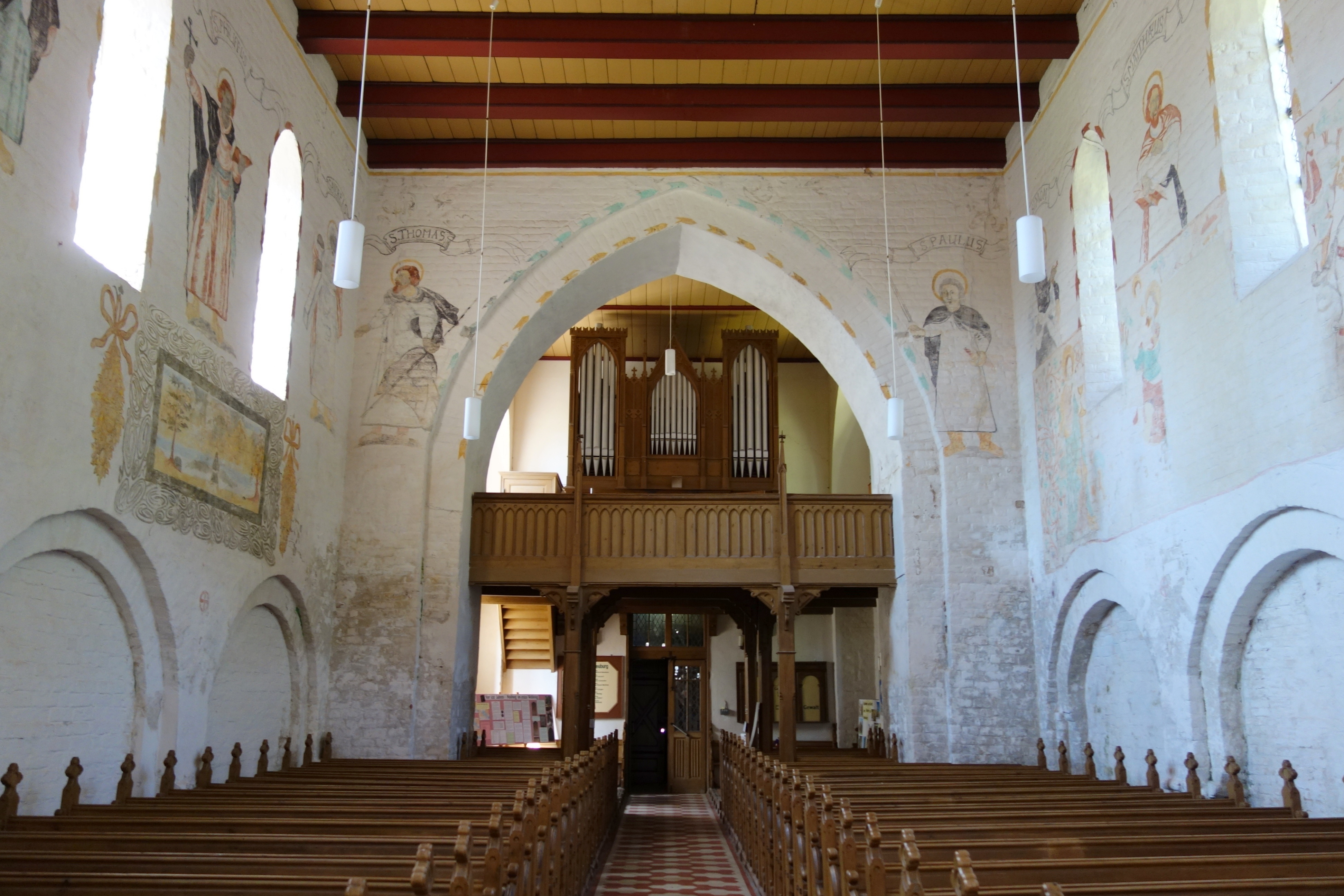 Dorfkirche Neuburg, Landkreis Nordwestmecklenburg, Mecklenburg-Vorpommern, Deutschland